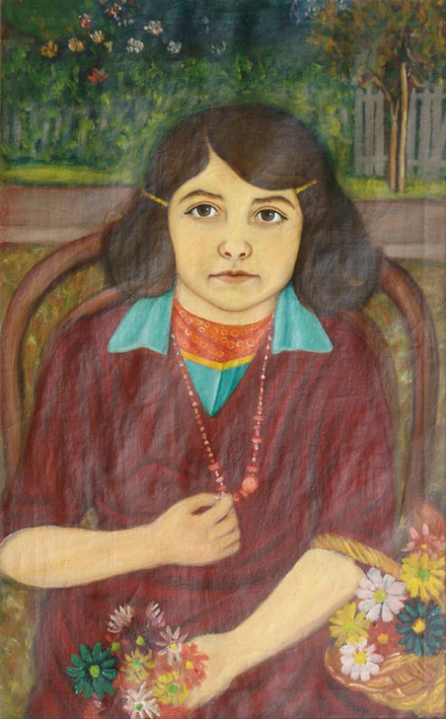 Brašić Janko, Portret ćerke,1939.ulje-platno,66x41 cm